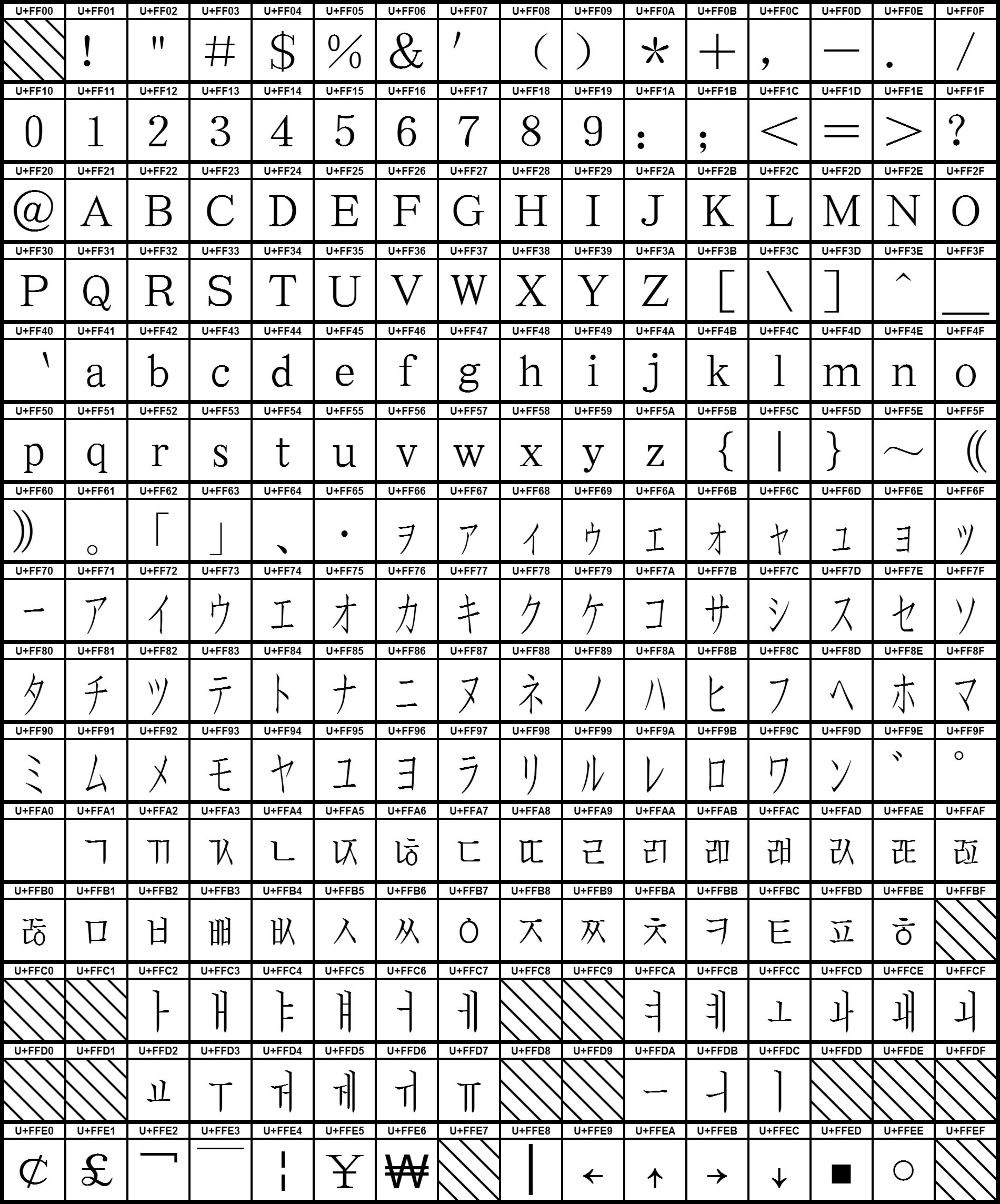 Grafiktafel für den Unicodeblock Halbbreite und vollbreite Formen. Schraffierte Felder sind unbesetzte Codepoints.